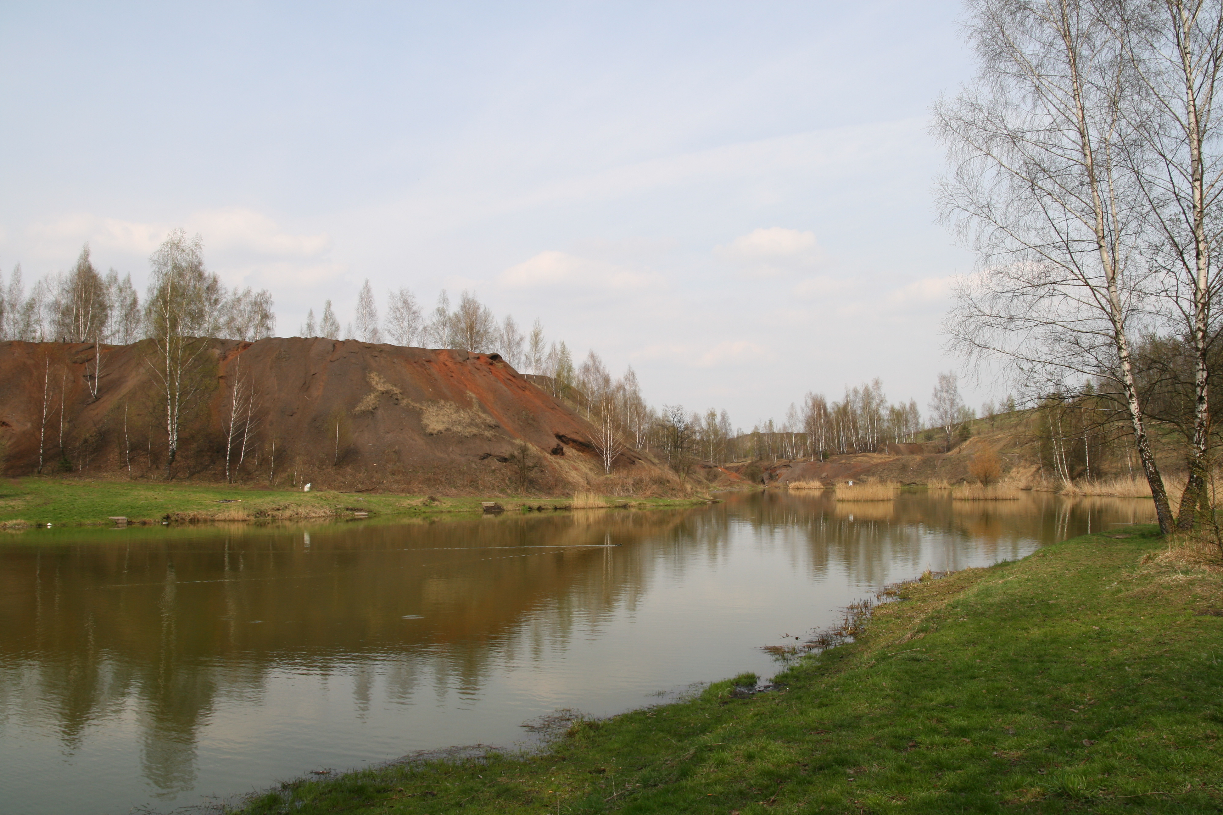 Staw Ajska na Chropaczowie w Świętochłowicach.